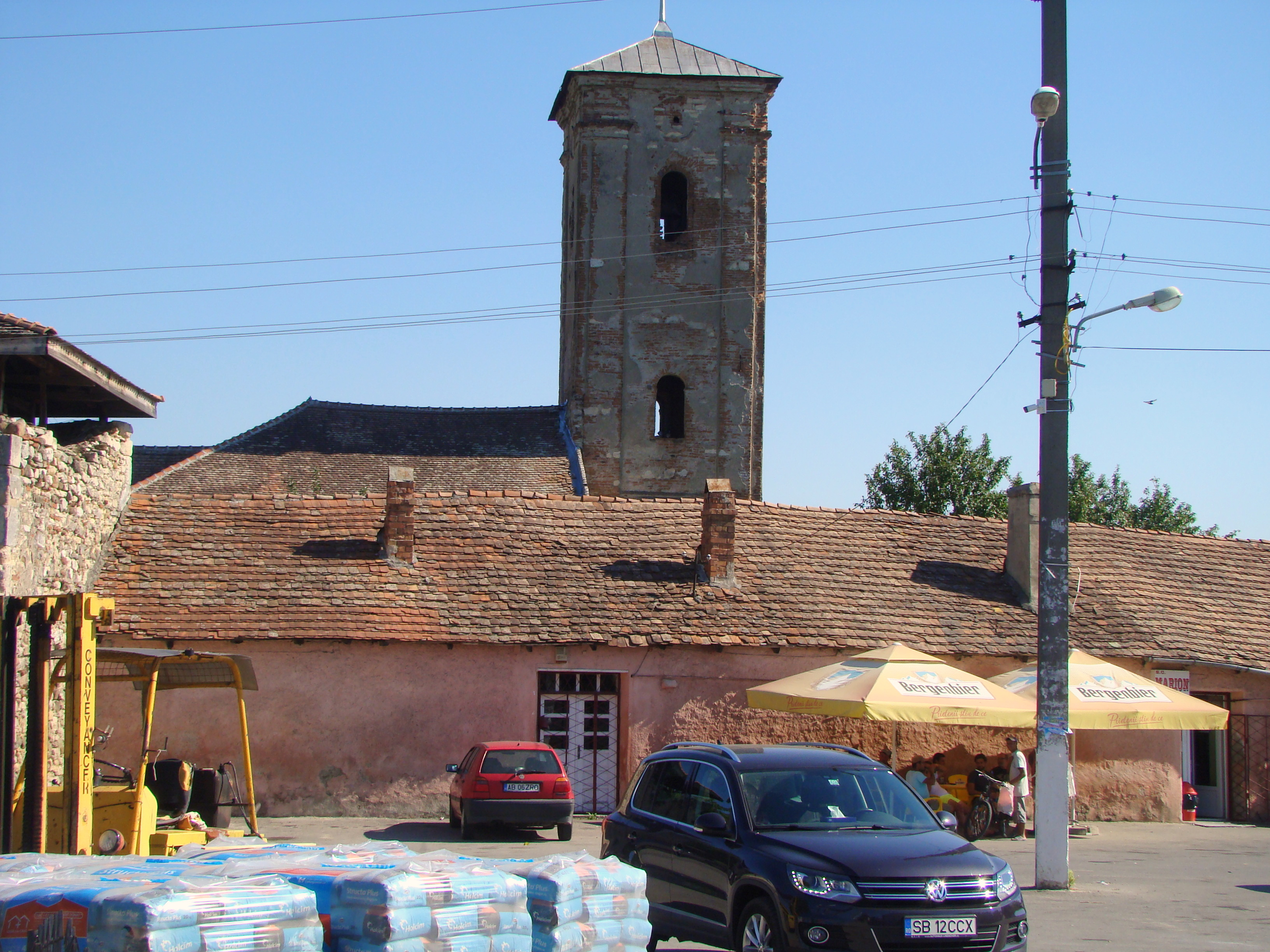 Ansamblul bisericii reformate, sat Șard; comuna Ighiu